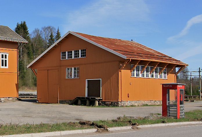 Godshus, Dal stasjon, Hovedbanen. Mulig byggeår 1854. Arkitekter: Heinrich Ernst Schirmer og Jens Flor. Freda.